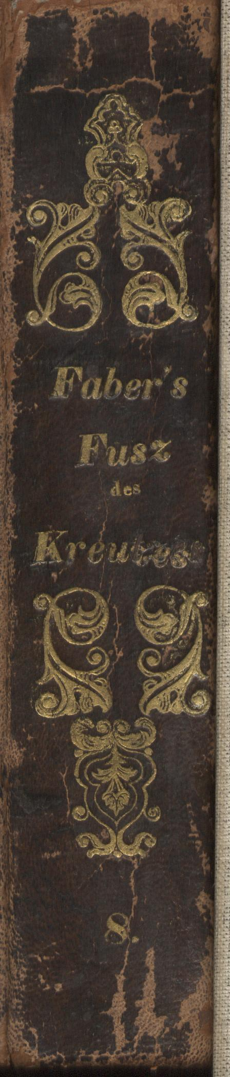 Frederick Faber, Buchrücken, 1859